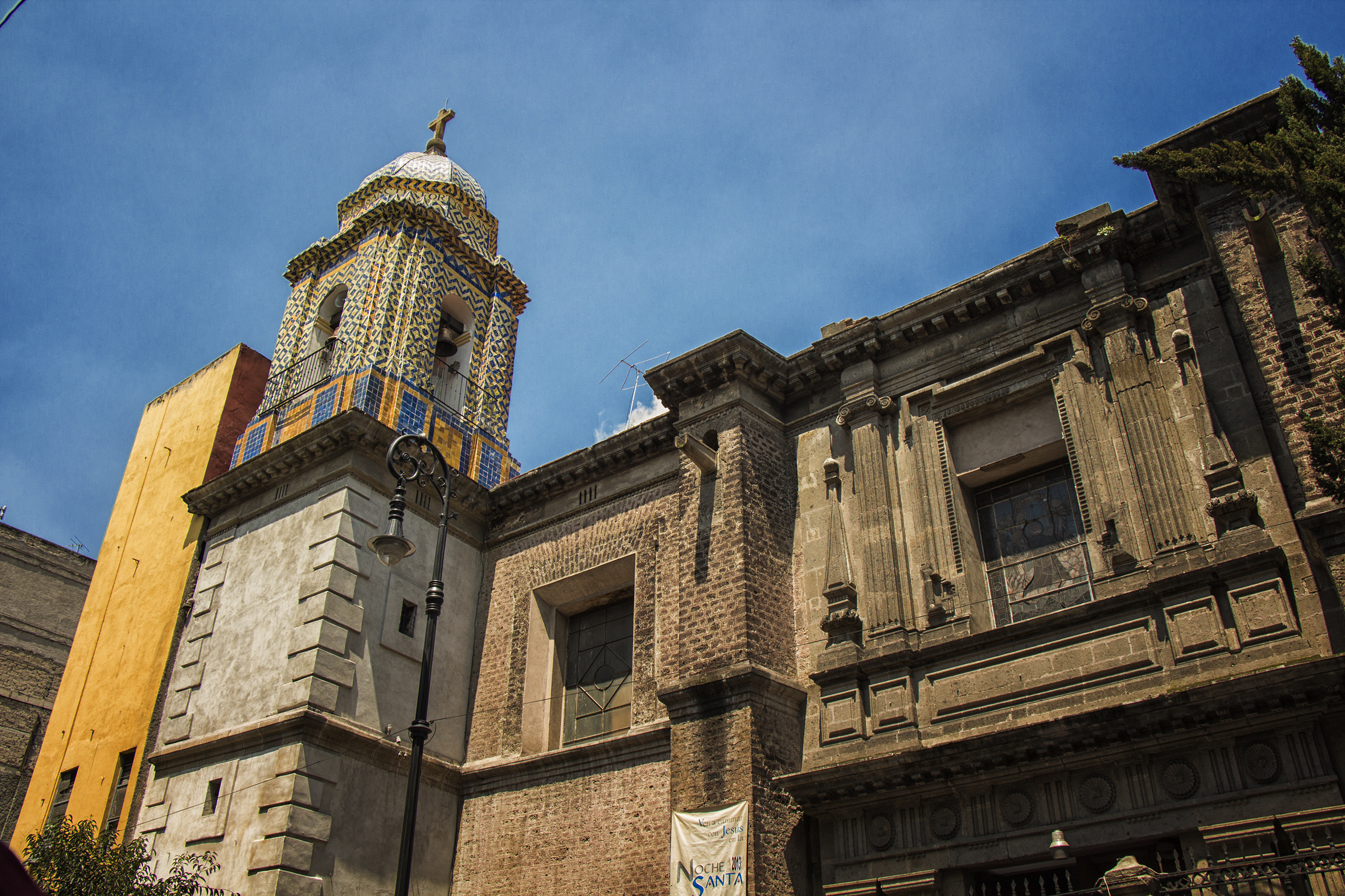 Templo de Nuestra Señora de Balvanera